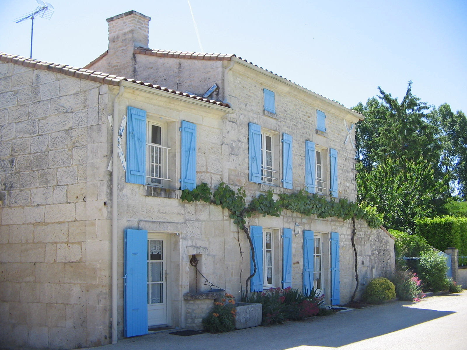 une maison aux volets bleus près du port de Courdault (85)